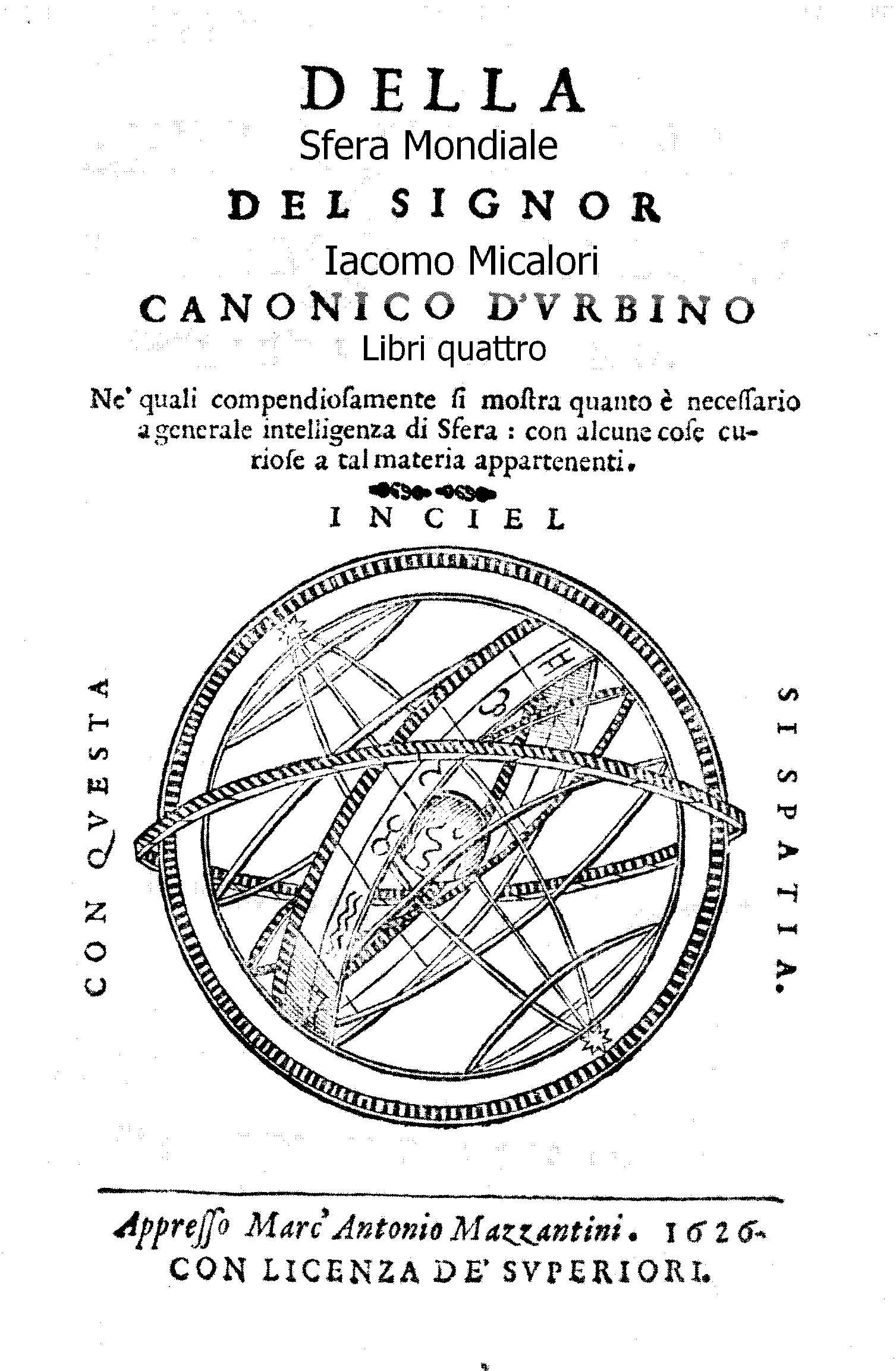 Della sfera mondiale del signor Iacomo Micalori canonico d'Vrbino libri quattro .... - In Urbino : appresso Marc'Antonio Mazzantini, 1626. - [8], 139, [5] p. : ill. ; 4º .